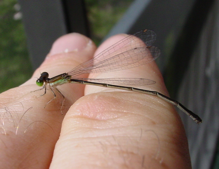 Furtive Forktail (Ischnura prognata), Osceola Co, 9-18-04